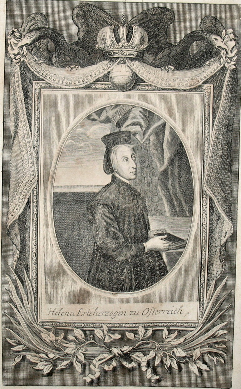 Erzherzogin Helena von Österreich (1543-1574), Nonne